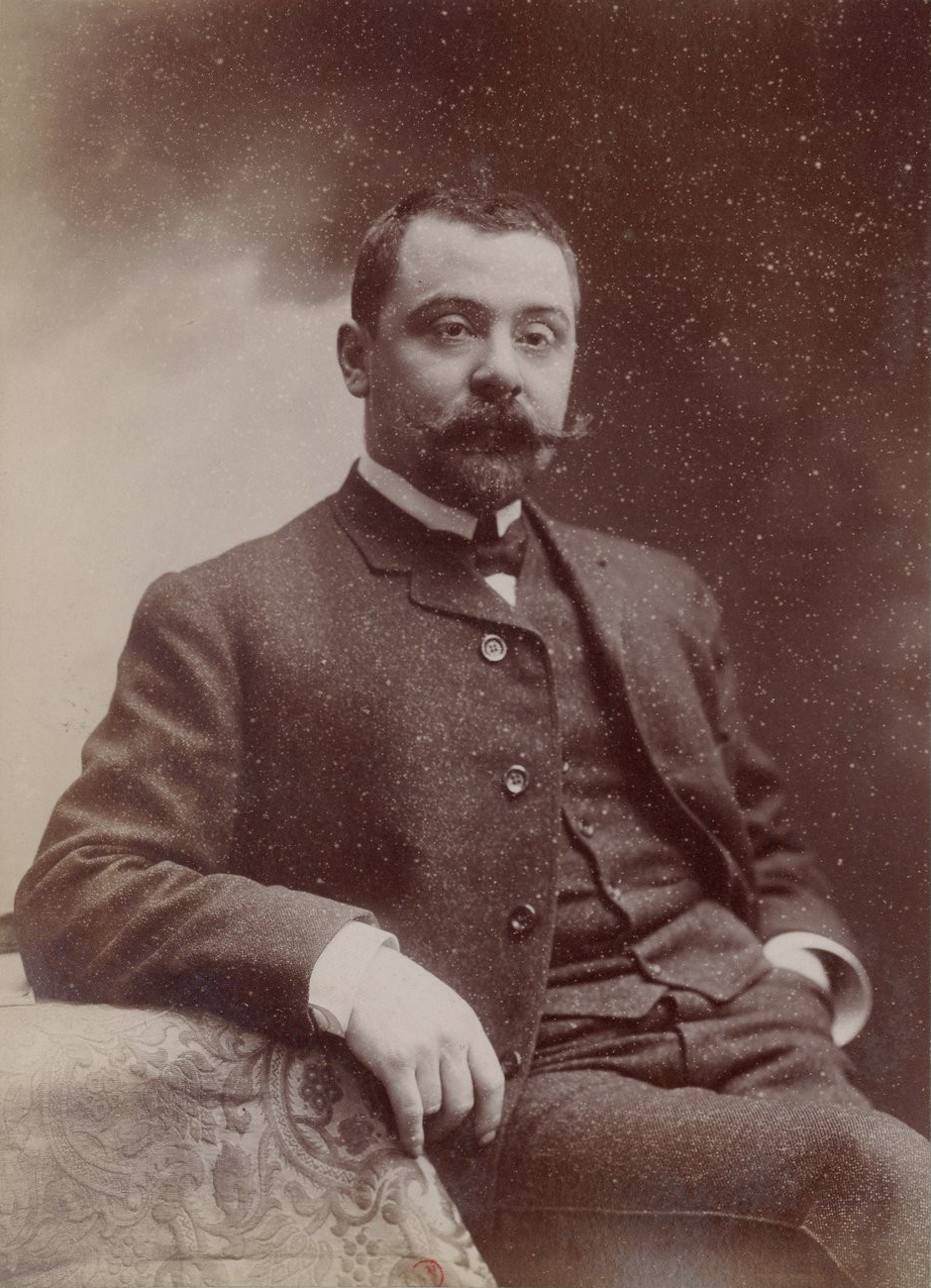 Portrait de Élie Faure (version recadrée)